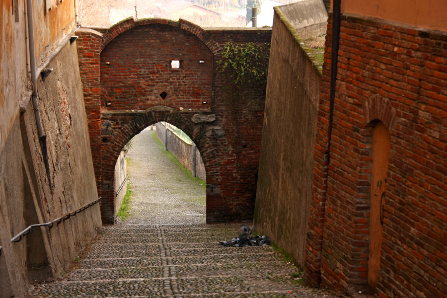 Oleggio (NO) - Porta Mazzeri, lungo l'antica cinta muraria fortificata